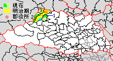 児玉郡の範囲 緑：現在の範囲（薄緑は編入部）黄：明治期の範囲（薄黄は編入部）